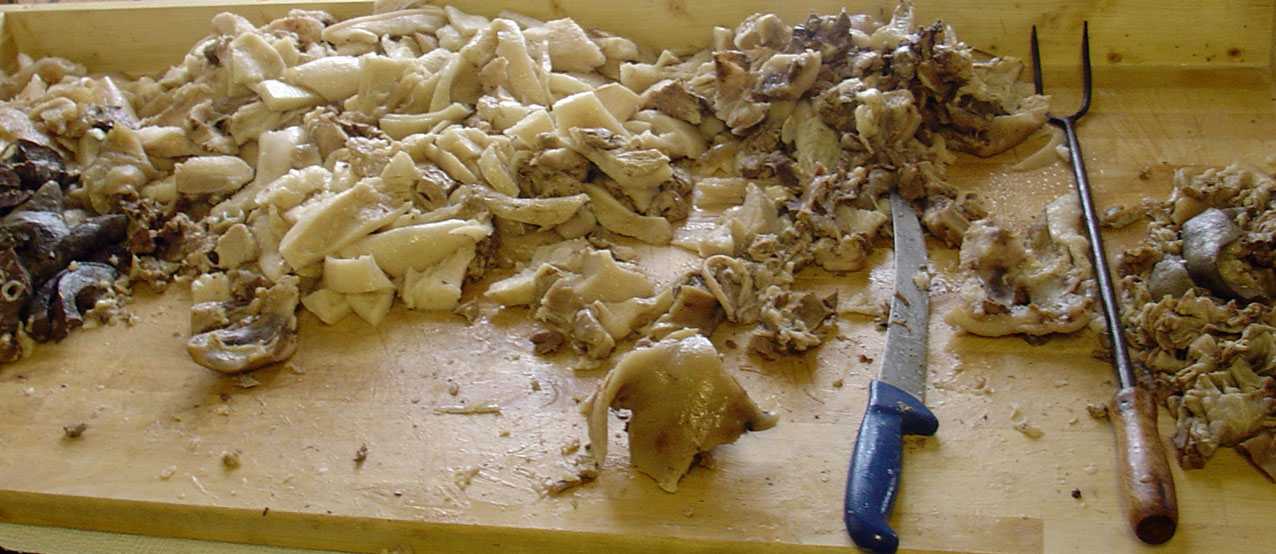 Blutwurstzutaten bei Hausschlachtung